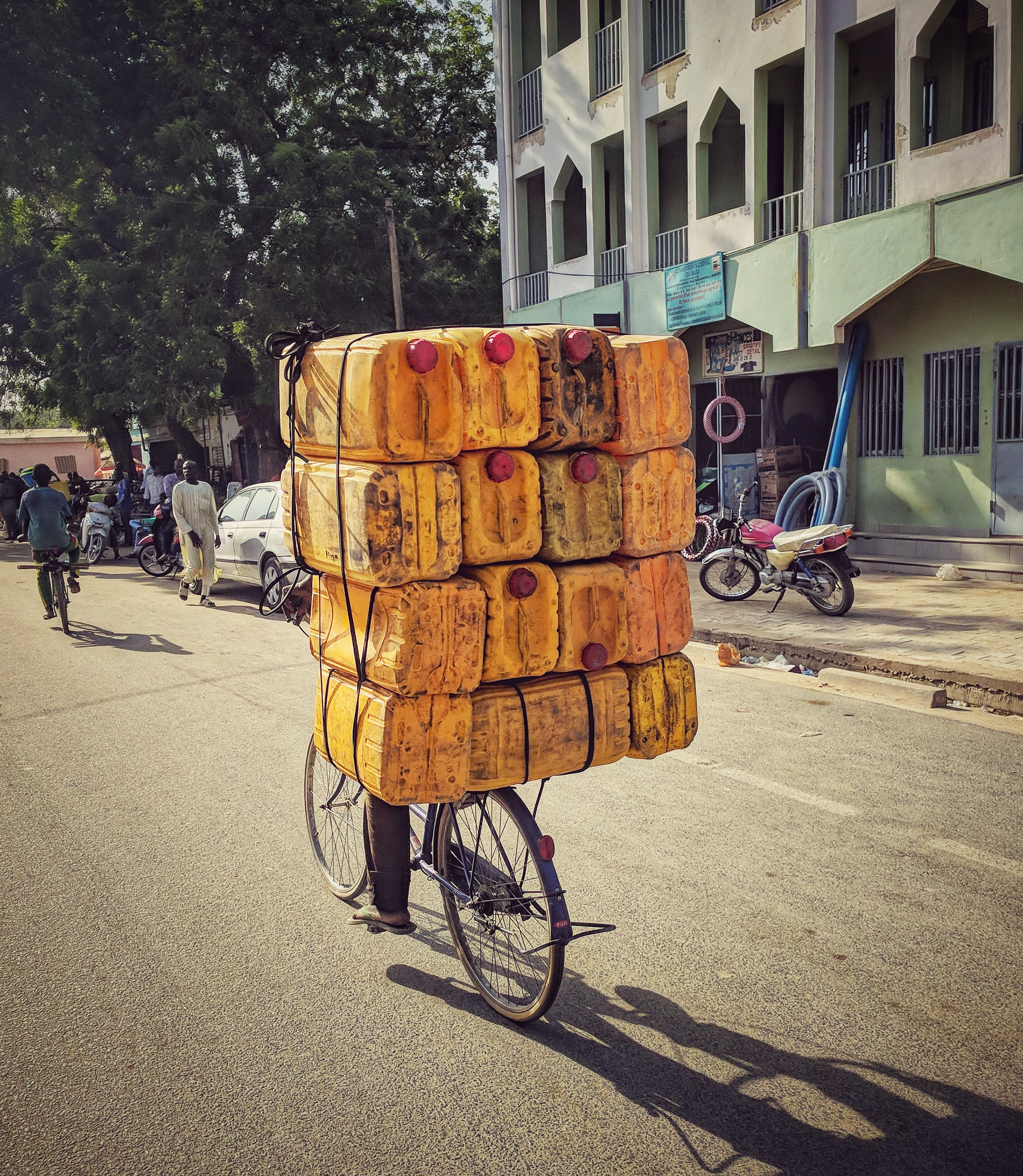 Transporteur de carburant dans la ville de Maroua, Extrême-Nord This is an image with the theme "Africa on the Move or Transport" from: Cameroon